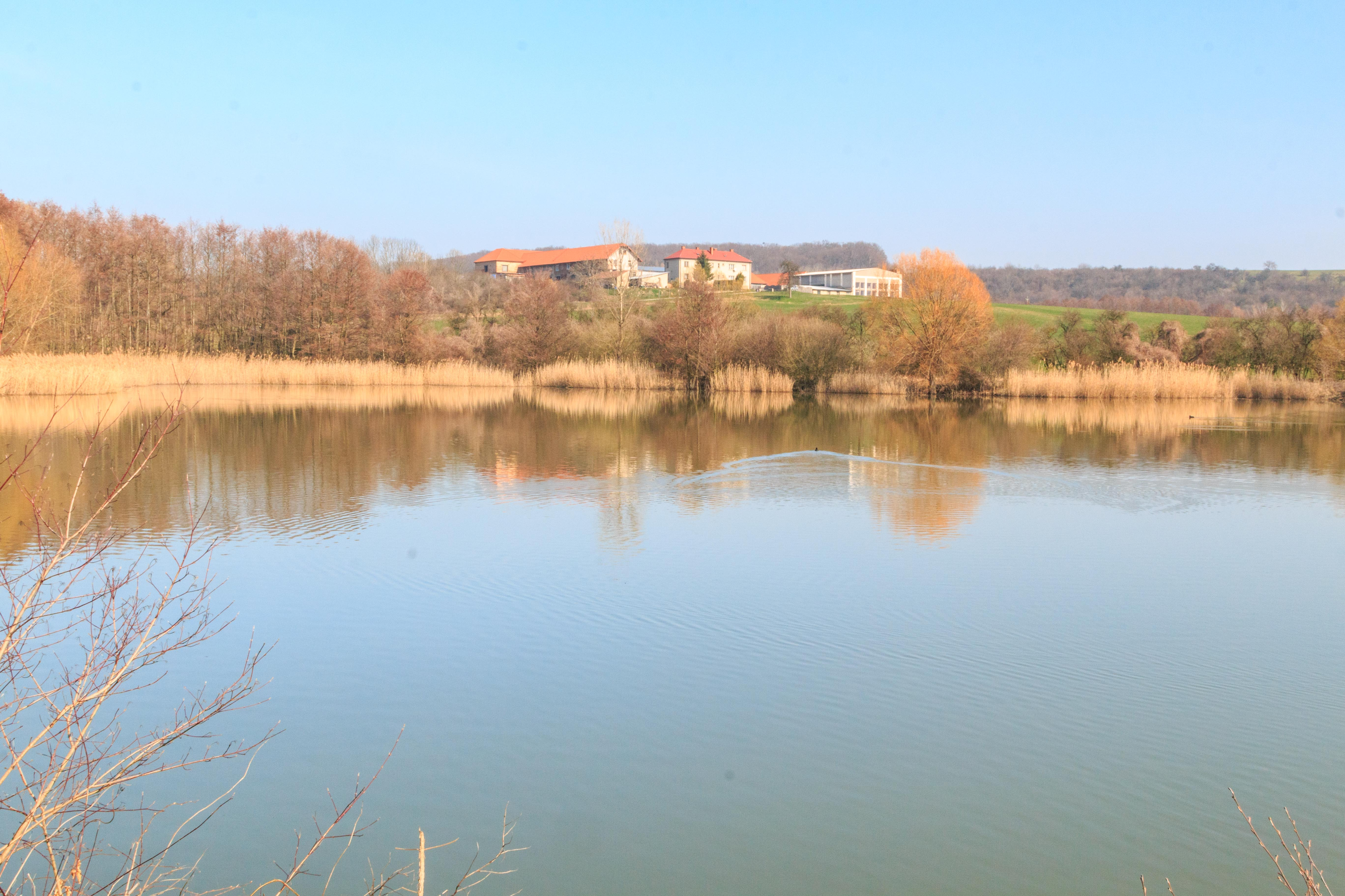 Rybník Ervín u Lična